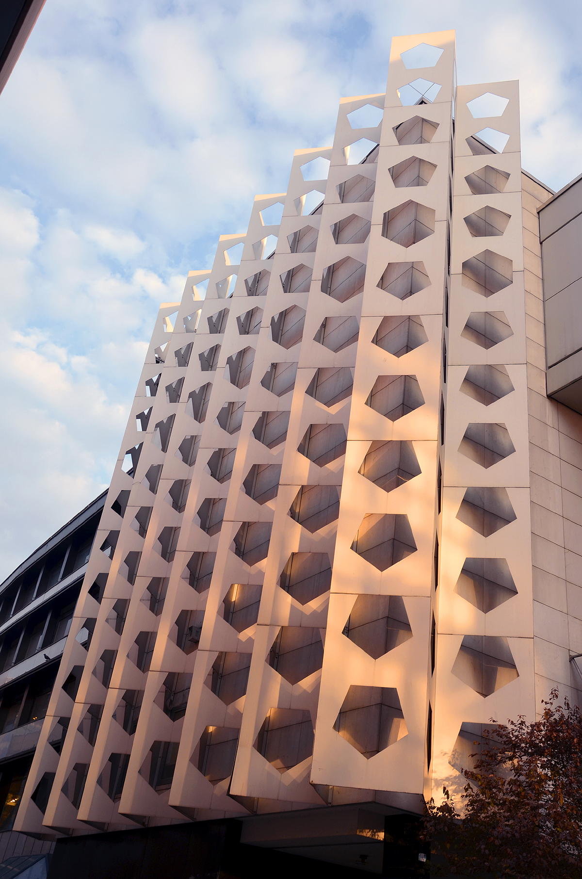 Eine Ecke des Gebäudes des ehemaligen Herrenausstatters Erdmann in Hannover wurde mit einer haushohen über Eck reichen Stahlskulptur mit gleichseitigen Fünfeck-Aussparungen verkleidet, hier fotodokumentiert am Spätnachmittag im Licht der untergehenden Sonne ...